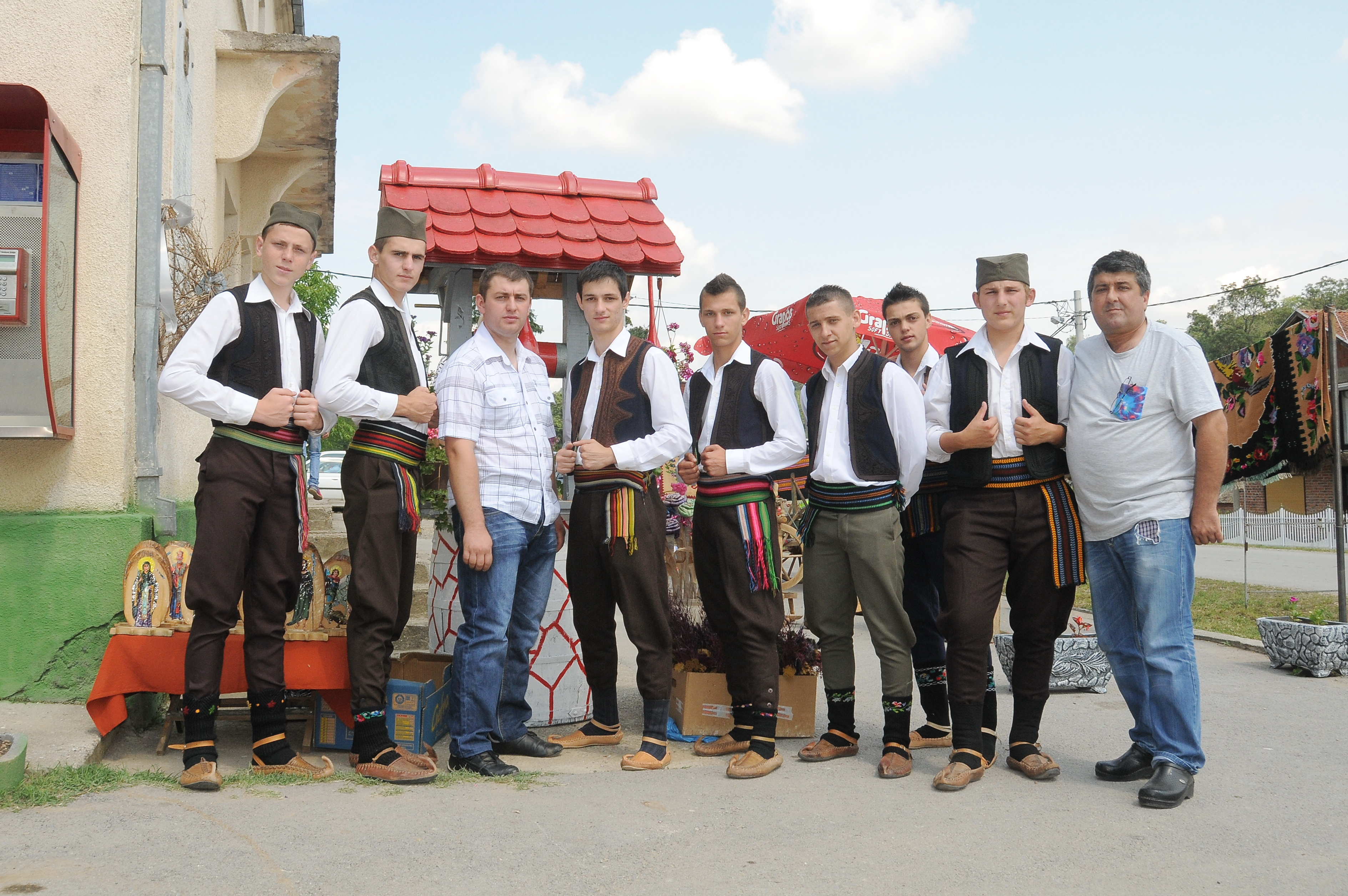 Smotra krava u Sibnici 2013